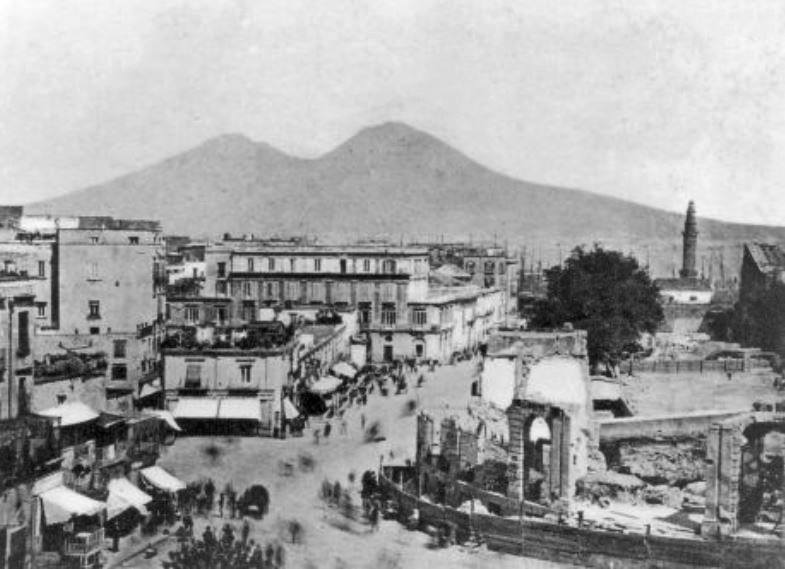 Napoli. Abbattimento in corso della Gran Guardia e dei Bastioni Aragonesi per la realizzazione dell'attuale Piazza Municipio. (Uno degli otto scatti che Giacomo Arena eseguì tra il 1873 e il 1875 per documentare i rifacimenti di piazza municipio).